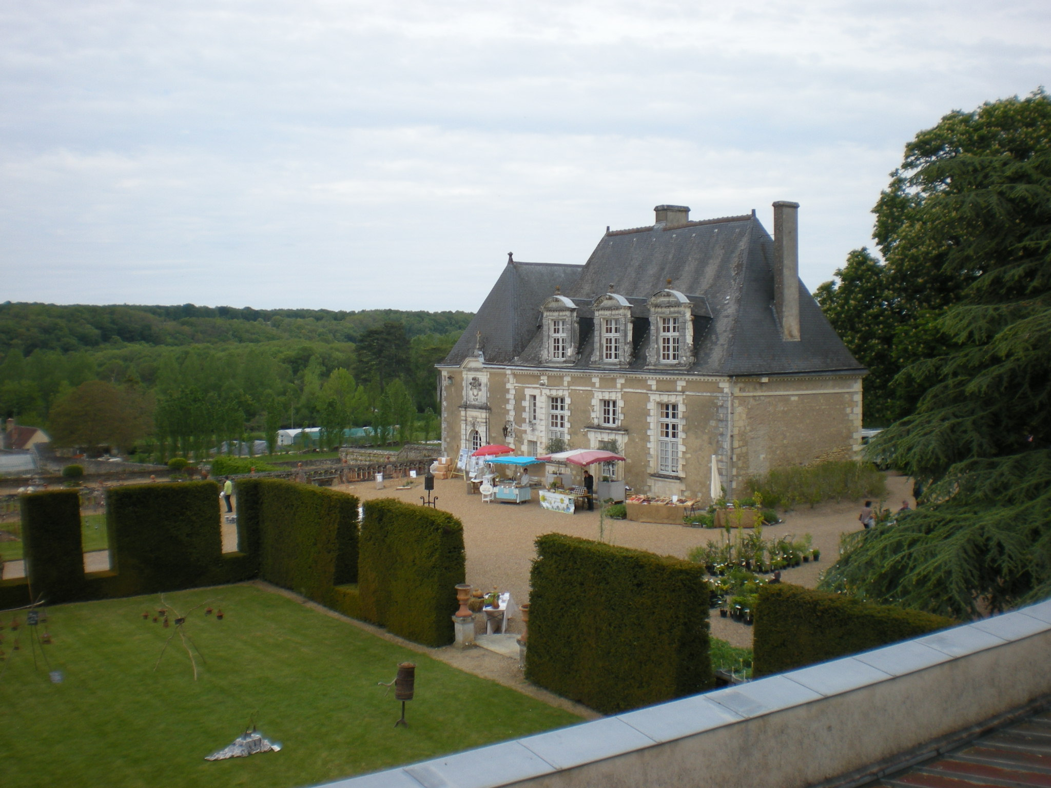 Château de Valmer, Chançay, France .